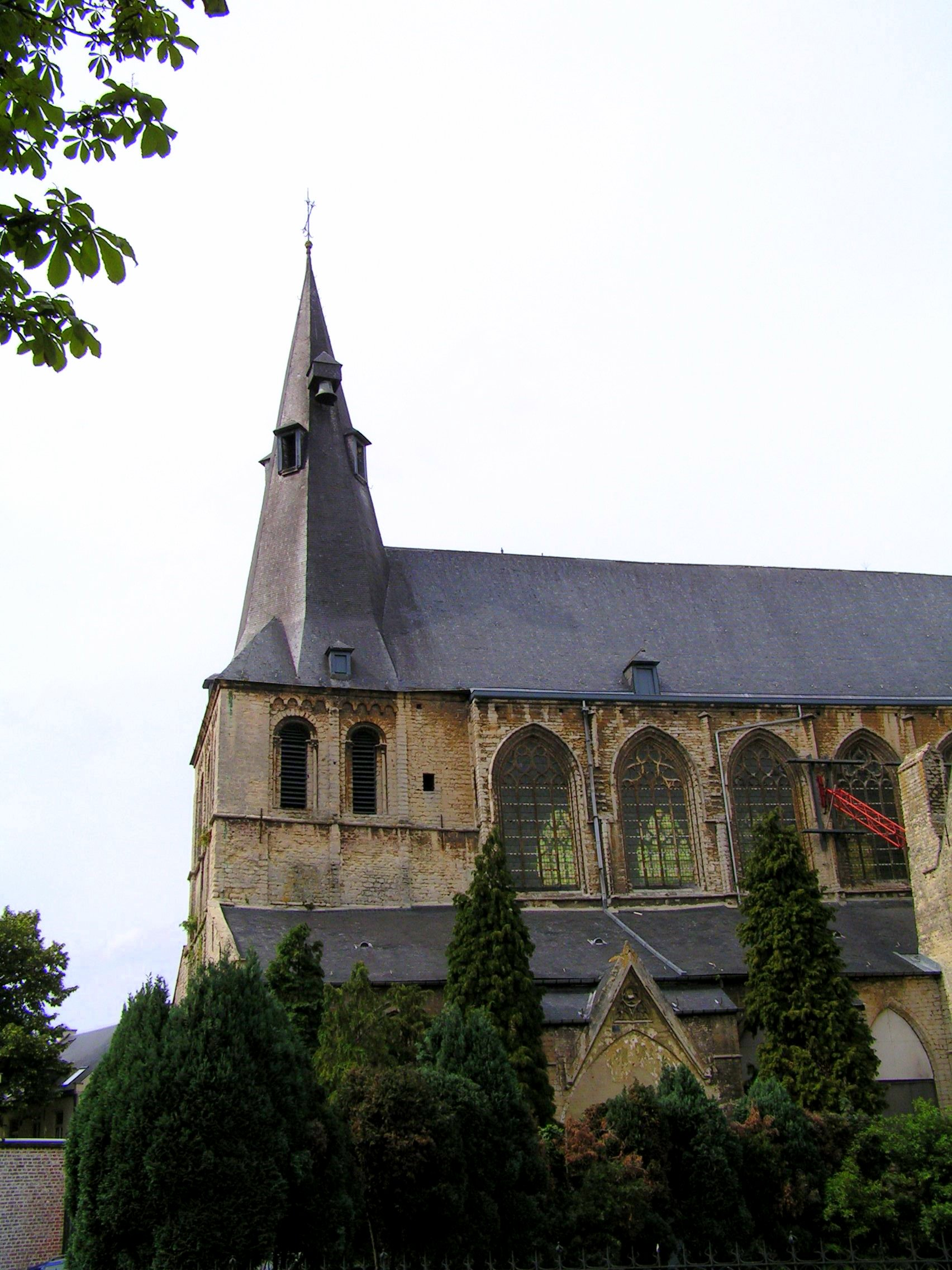 St. Jacob, Leuven, Belgium